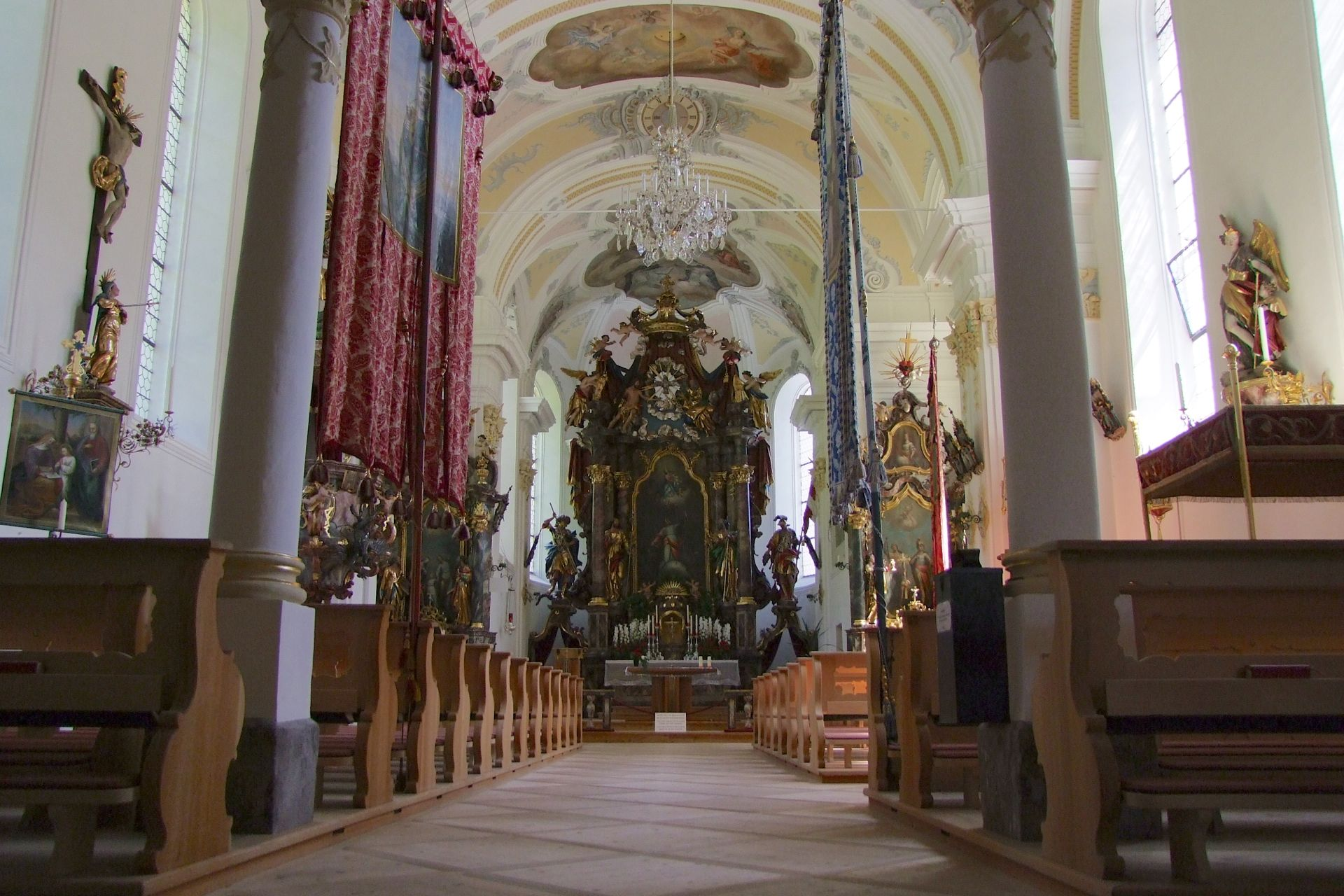 Kath. Pfarrkirche hl. Jakobus d. Ä.